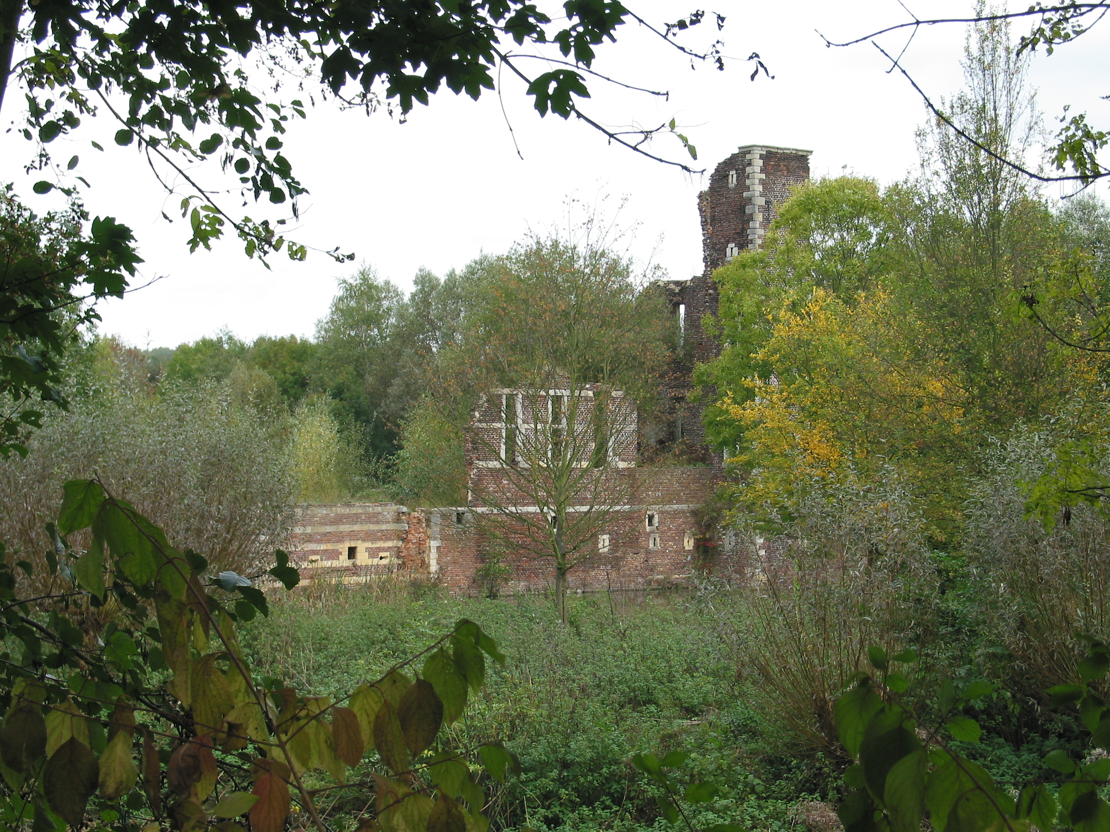 Kasteel Schaesberg van een andere hoek